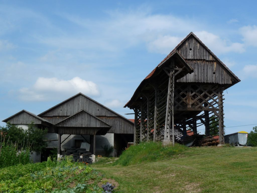 Skednji v Dobovici